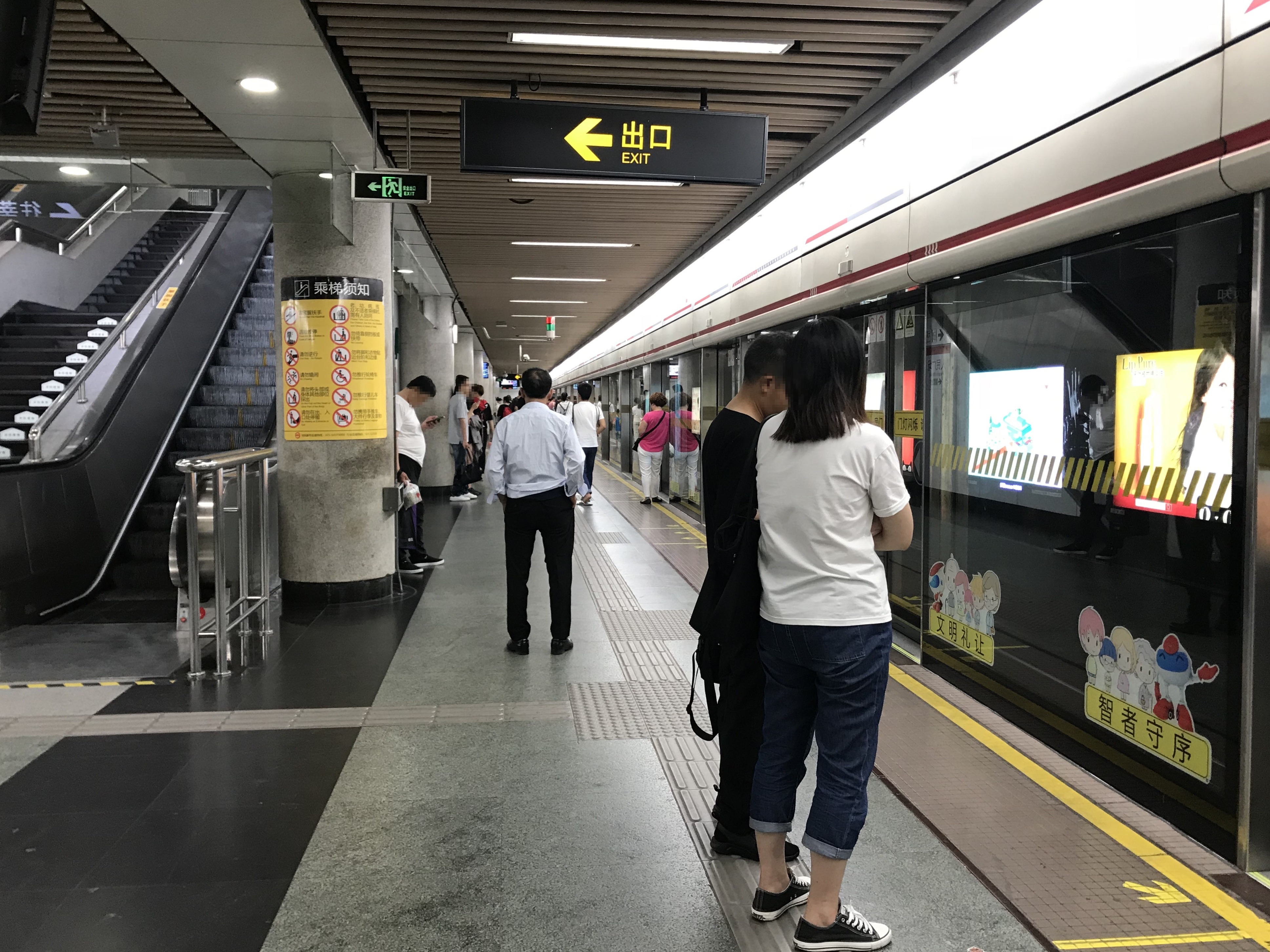 人民広場駅(上海地下鉄1号線)のホーム